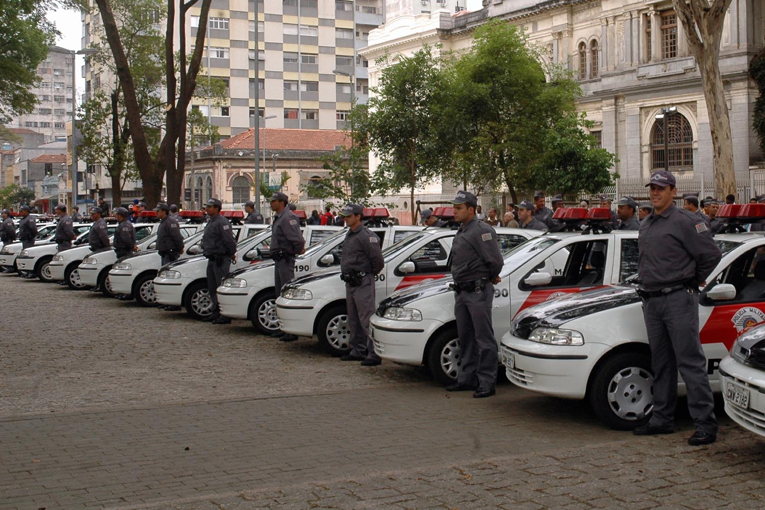 Imagem de SP